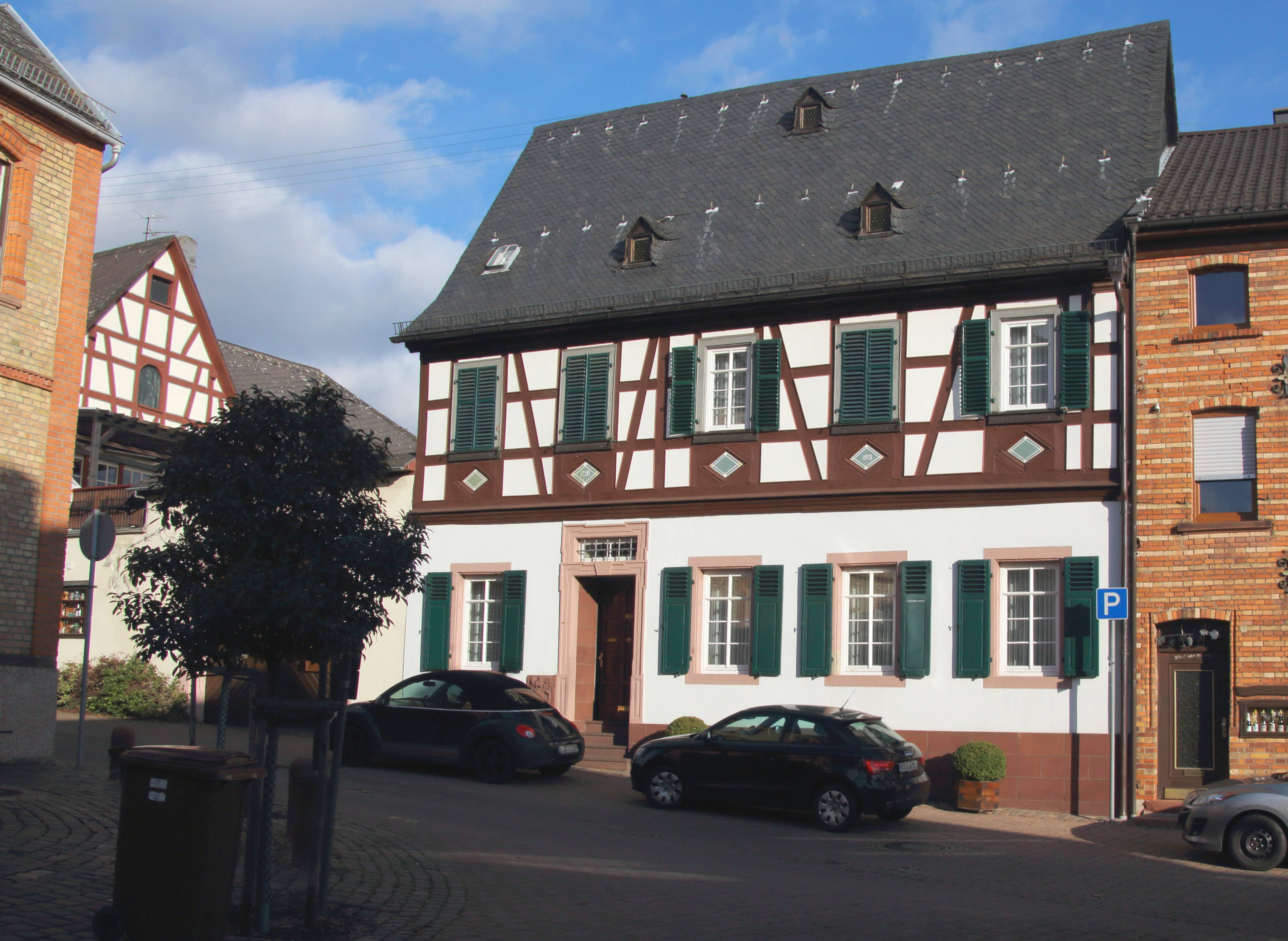 Teil des ehemaligen Eberbacher Klosterhofes. Heutiges Gebäude nach den Zerstörungen des Dreißigjährigen Krieges 1720 neu errichtet. Ehemaliges Wohnhaus des Schriftstellers Karl Rolf Seufert. Hallgartener Platz 12, Hallgarten im Rheingau, Hessen